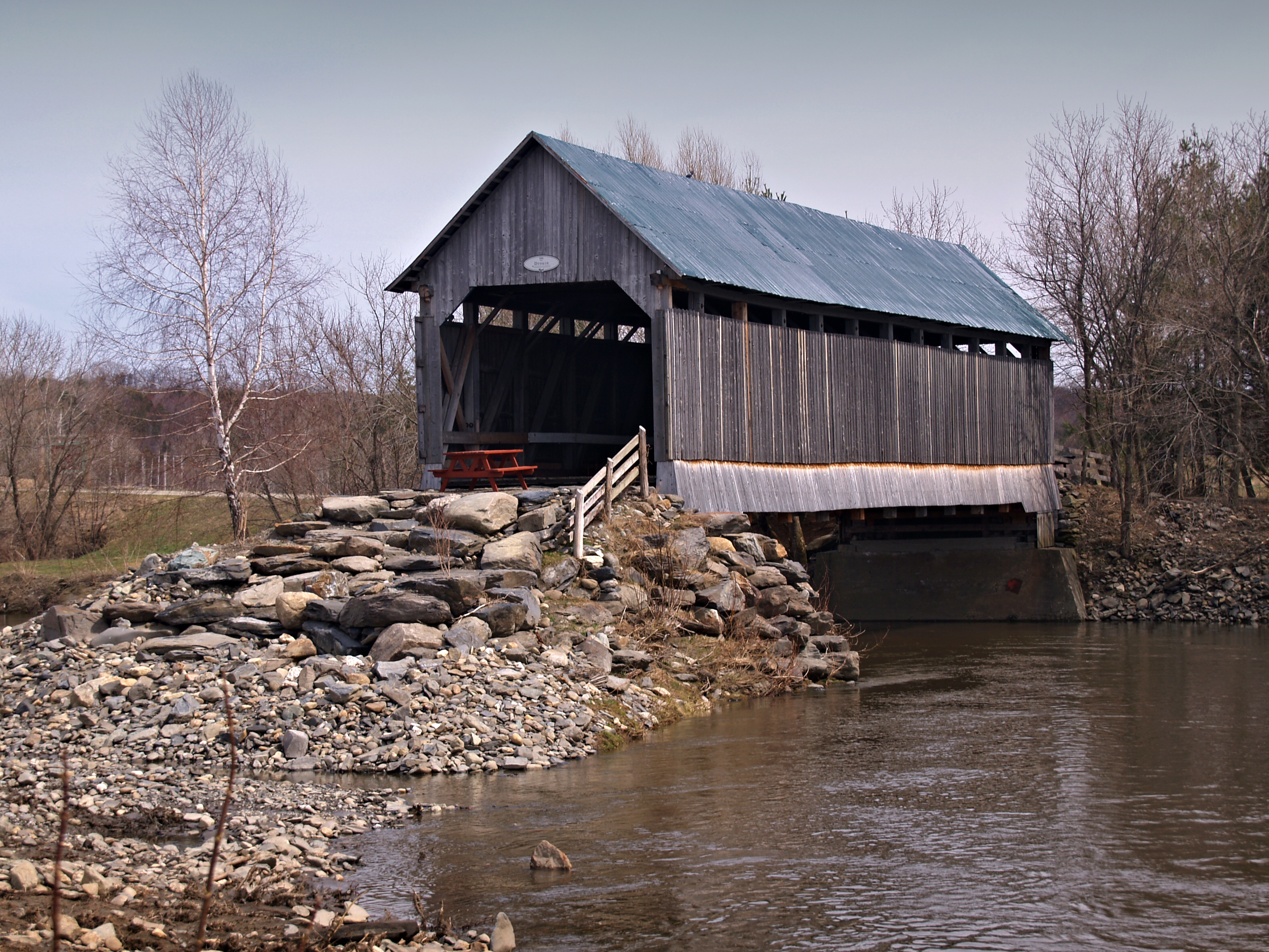 Compton (Québec) - Pont Drouin sur la rivière Coaticook